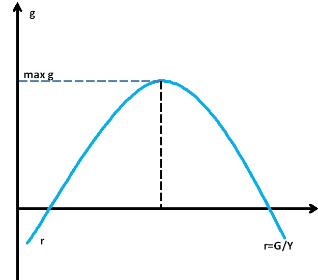 Кривая Лаффера модель Барро